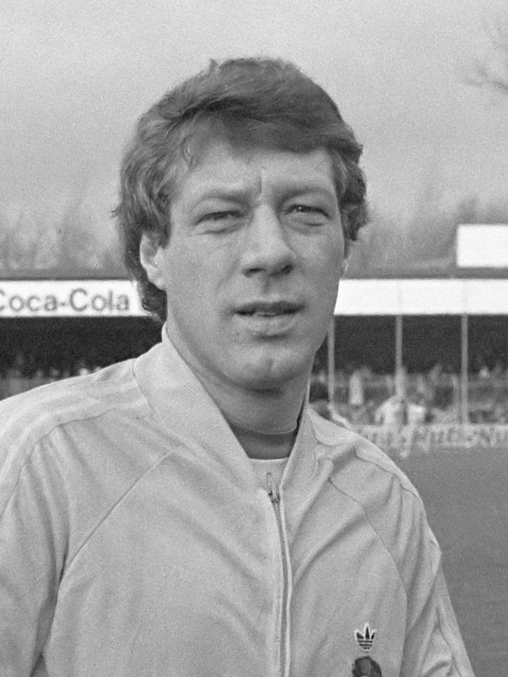 FC Den Haag tegen AZ 67 1-4. Aad Mansveld voor de wedstrijd 6 december 1981